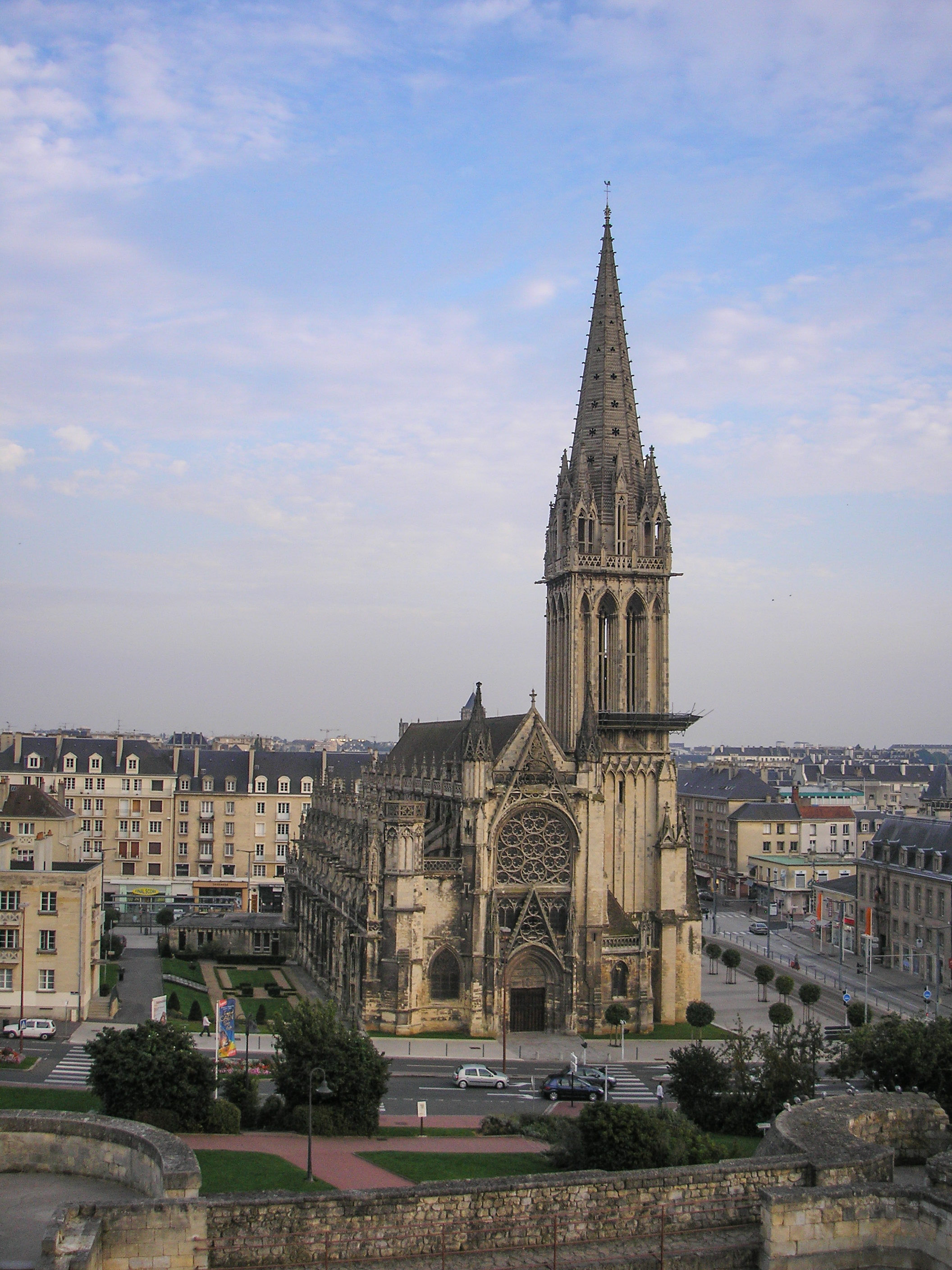 Caen (Normandie, France). L'église Saint-Pierre, vue du château.